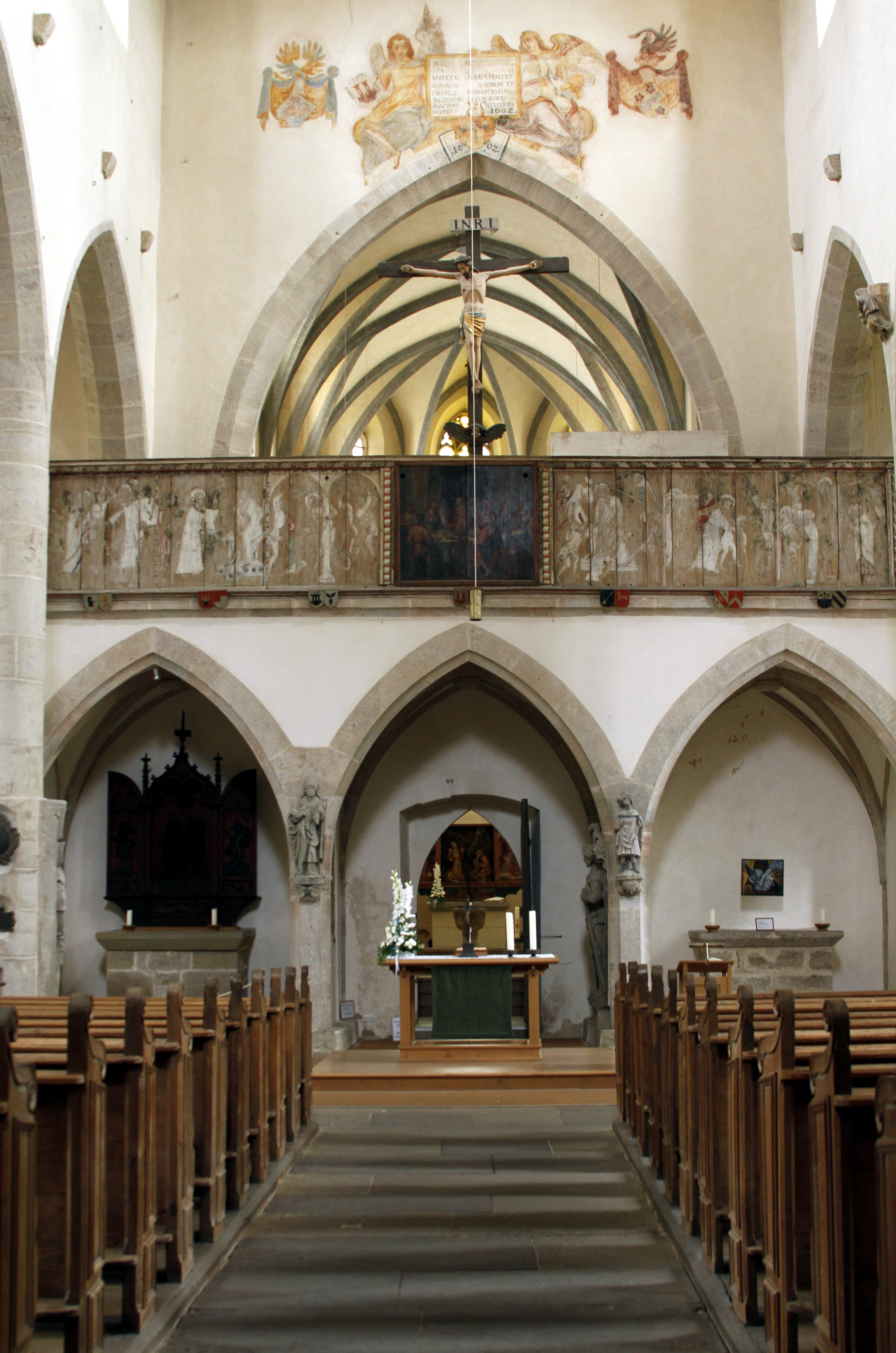 Franziskanerkirche - Rothenburg ob der Tauber - Germany